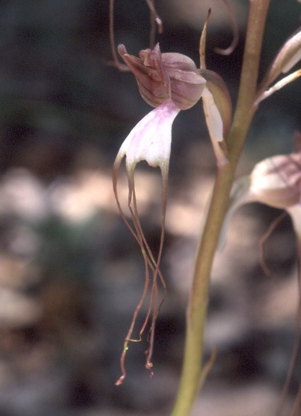 Comperia comperiana, Türkei - Konya